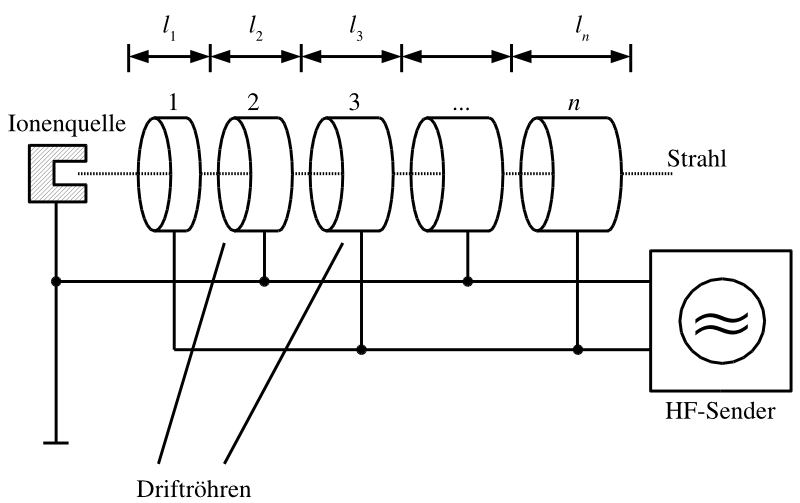 Principo de construcción de un acelerador lineal según Ising y Wideröe Linear accelerator after Rolf Wideröe, German captions, cf original SVG version and English SVG version. Used by Linearbeschleuniger. Drawn by Florian Nolz